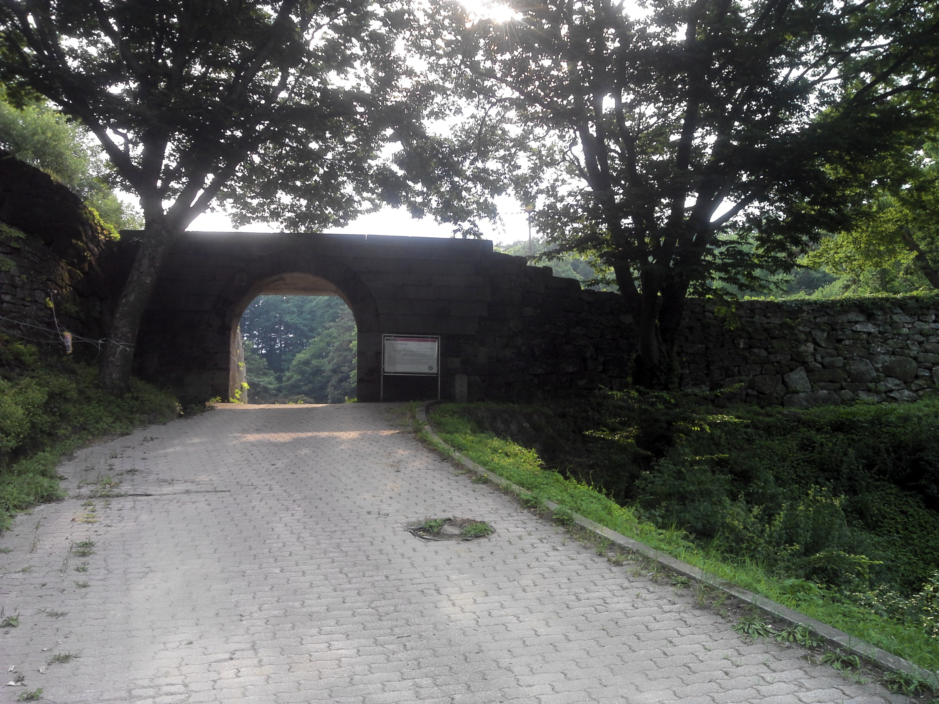 안성시 죽산면의 죽주산성 입구